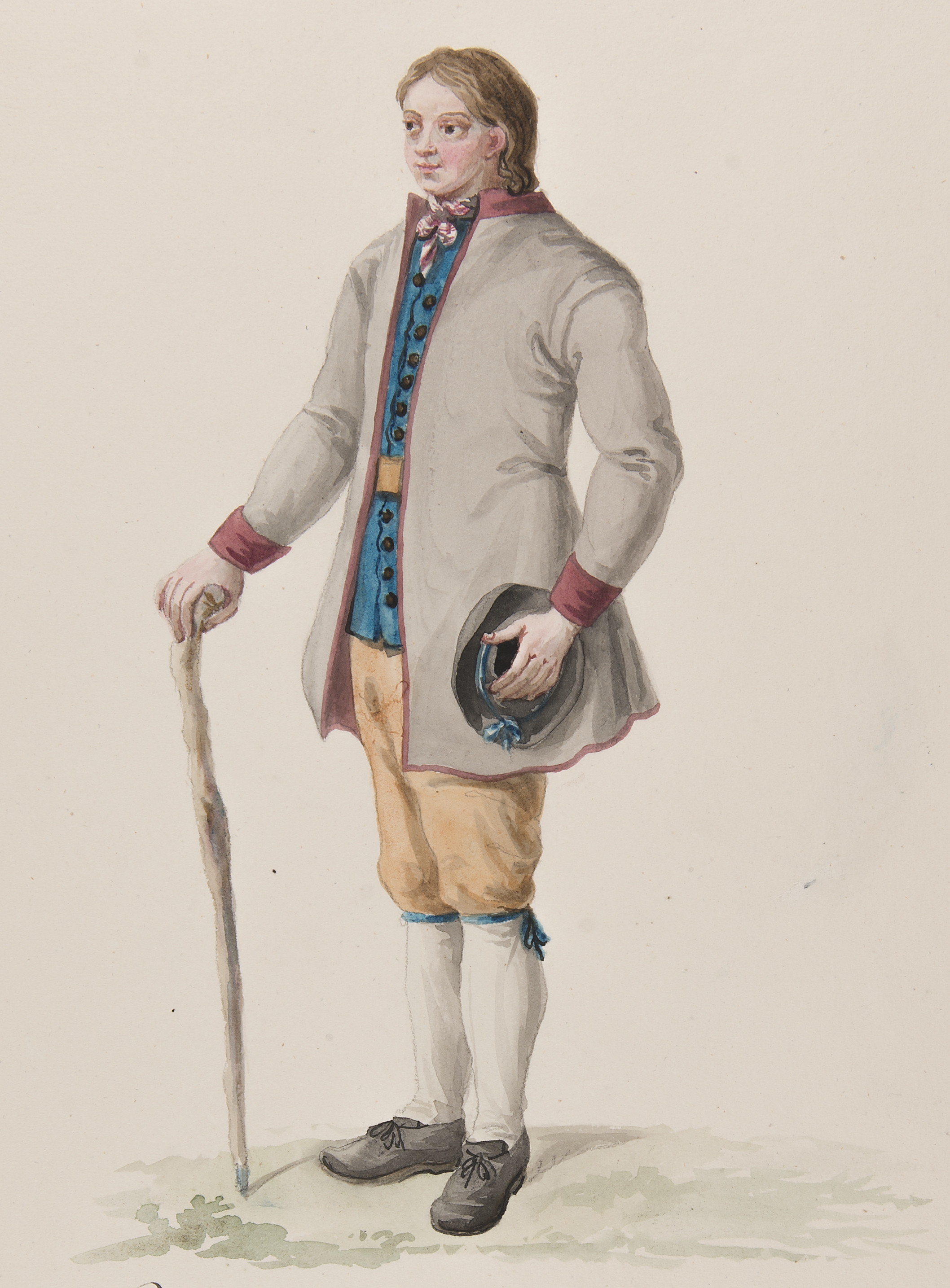 Dräkt. Habitant de la Province de Wermeland- Akvarell i storformat av C.W Swedman. Text på pasepartout: "Jfr 'Costume of Sweden pl 6'" Depicted place: Sweden (Q34) (Land), Värmland (Q211638) (Landskap)